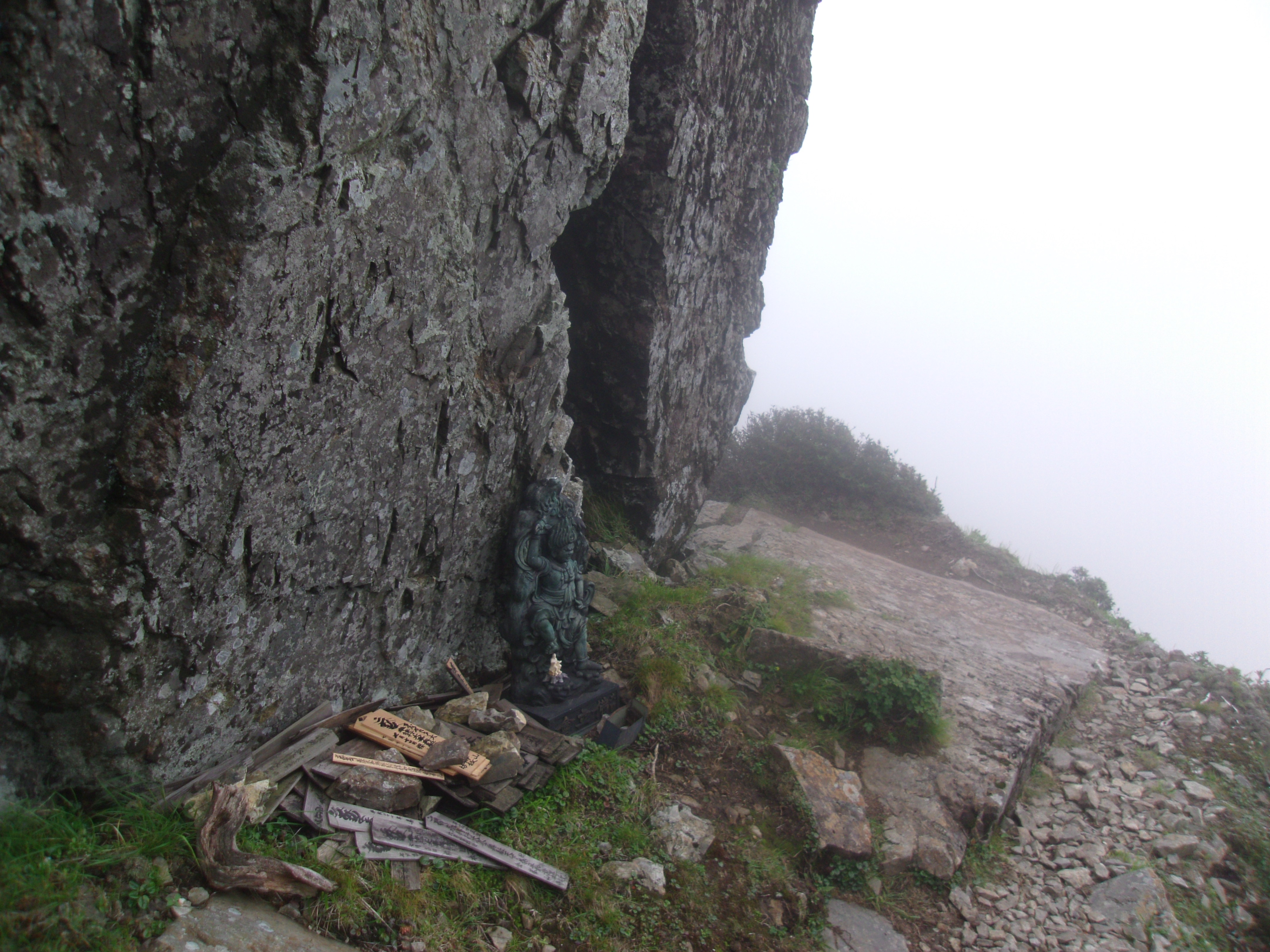 大峯奥駈道第42靡「孔雀岳」と41靡「空鉢岳」の間にある「椽(えん)の鼻」